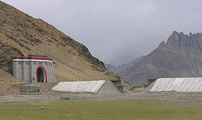 Die Tibet-Bahn: letzter Tunnelausgang vor dem Lhasa-Bahnhof (Sommer 2005, kurz vor Vollendung der Strecke) eigenes Foto: Andreas Gruschke (Freiburg)